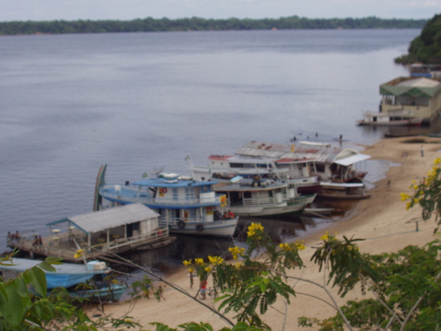 Boats at Amazon River. Novo Airao, Amazonas, Brazil.